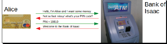 Монгол: ыбөа